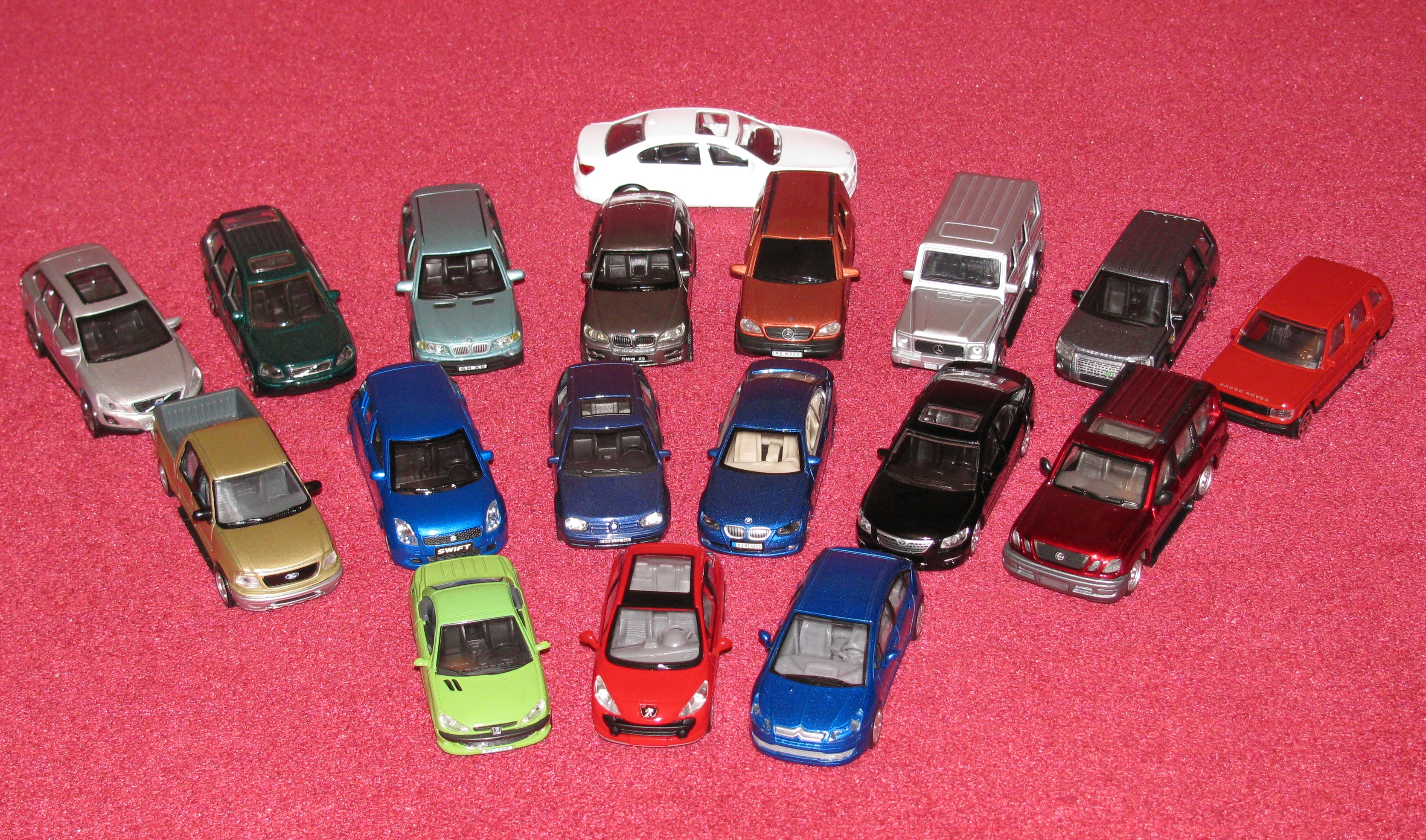 Иномарки